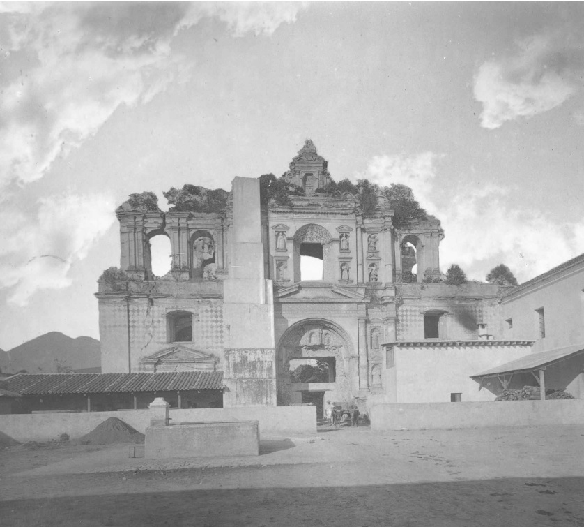 Iglesia de la Compañía de Jesús en Antigua Guatemala en 1880, luego del terremoto del 3 de septiembre de 1874.